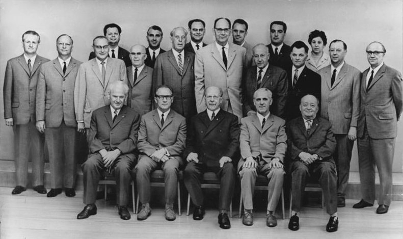 Zentralbild-Junge 26.7.1968 Mitglieder und Kandidaten des Politbüros des Zentralkomitees der Sozialistischen Einheitspartei Deutschlands. Walter Ulbricht, Erster Sekretär des ZK der SED und Vorsitzender des Staatsrates der DDR (1. Reihe, Mitte). Rechts daneben: Willi Stoph und Friedrich Ebert. Links daneben: Erich Honecker und Hermann Matern. 2. Reihe, v.l.n.r.: Günter Mittag, Kurt Hager, Paul Verner, Erich Mückenberger, Herbert Warnke, Alfred Neumann, Albert Norden, Paul Fröhlich, Gerhard Grüneberg und Horst Sindermann. 3. Reihe, v.l.n.r. die Kandidaten des Politbüros Hermann Axen, Georg Ewald, Walter Halbritter, Werner Jarowinsky, Günther Kleiber und Margarete Müller.